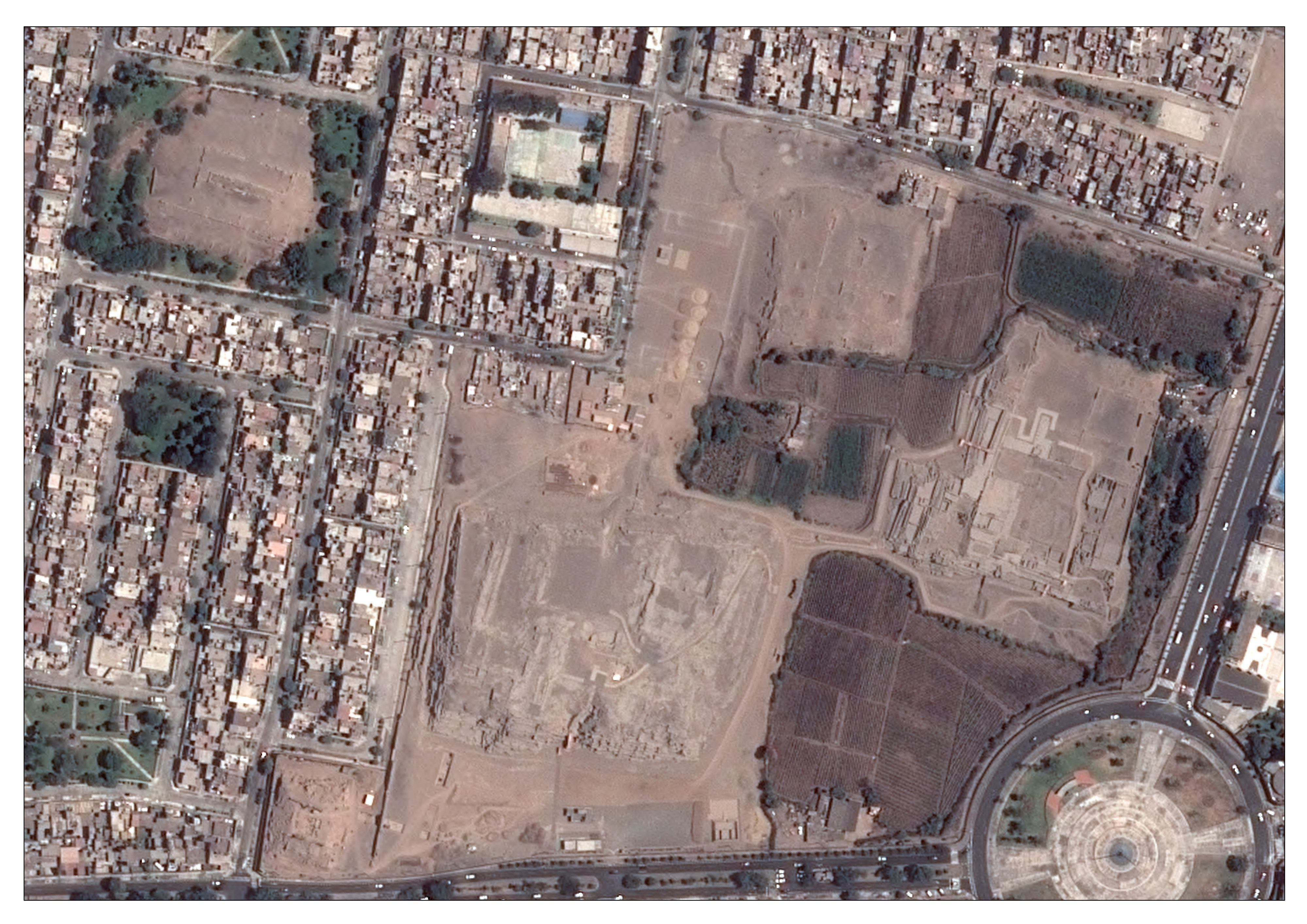 Sitio arqueológico de Mateos Salado, Breña, Lima, Perú. Imagen de PeruSat-1.